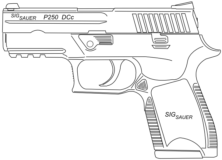 SIG P250DCc